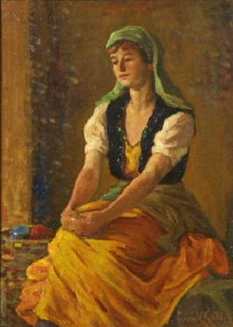 Mary McIvor, olio su tela, 40.6 x 55.9 cm., coll. privata